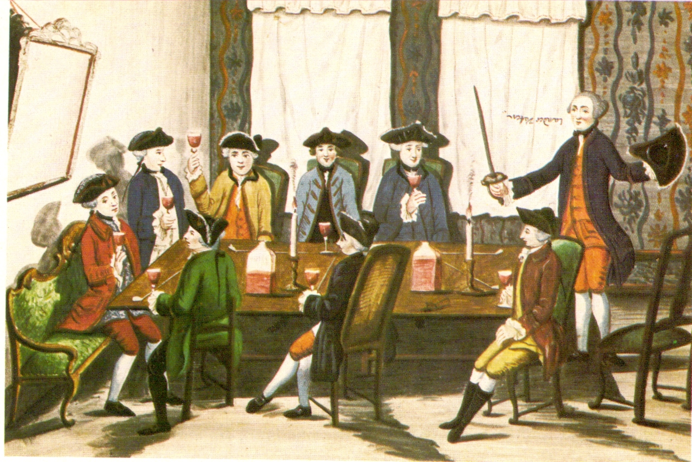 Stammbuchblatt aus dem Stammbuch Barner (1765) im Stadtarchiv Göttingen. Göttinger Studenten beim feierlichen Landesvater. Im Verlauf der Zeremonie werden die Hüte auf den Degen gespiesst. Der stehende Chargierte gibt hierzu gerade das Kommando.